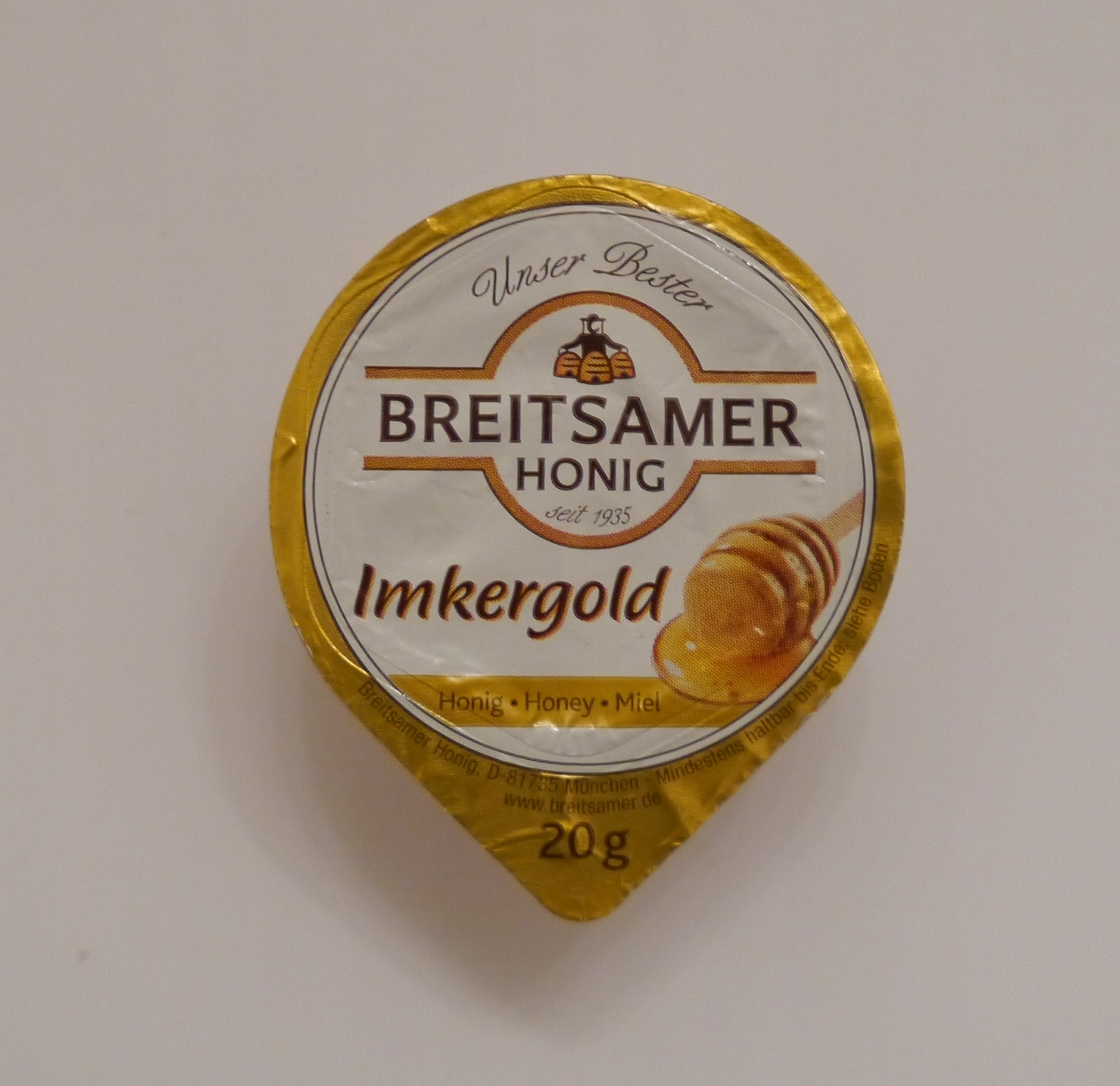 Breitsamer_Bienenwirtschaft Meißen 2013.